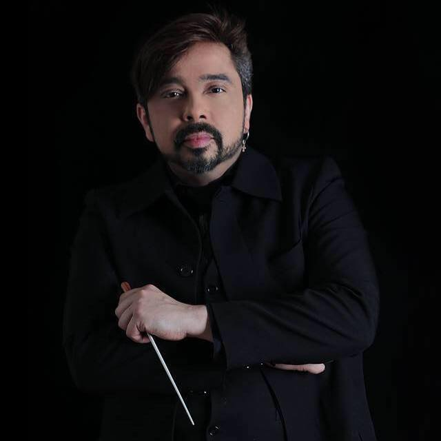 Contratenor, Maestro e Diretor de Grandes Musicais no Brasil. Atualmente dedica-se ao ensino do “Belting Contemporâneo” pelo Brasil, através do seu livro de mesmo título, da editora MusiMed.